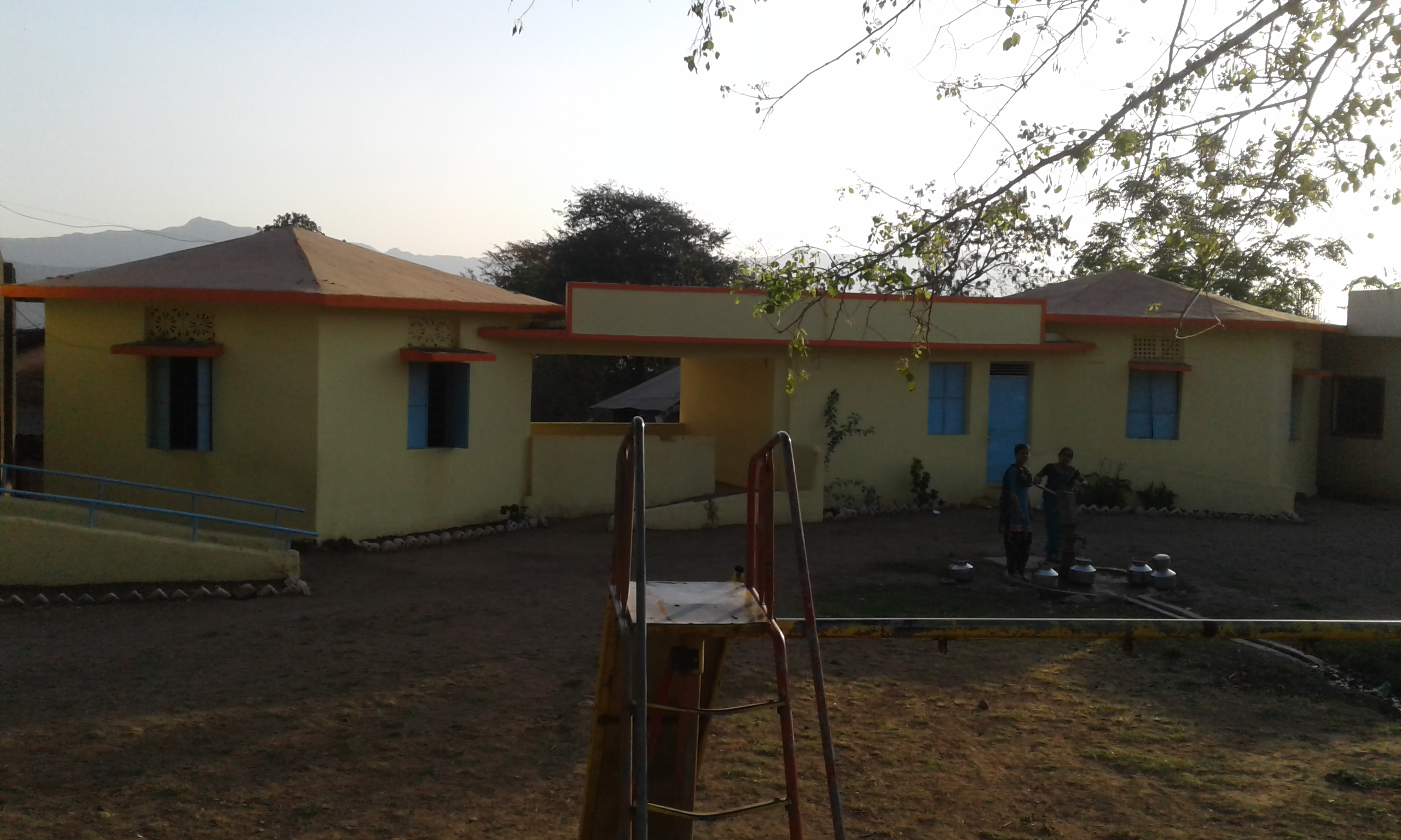 पूर्व प्राथमिक शाळा